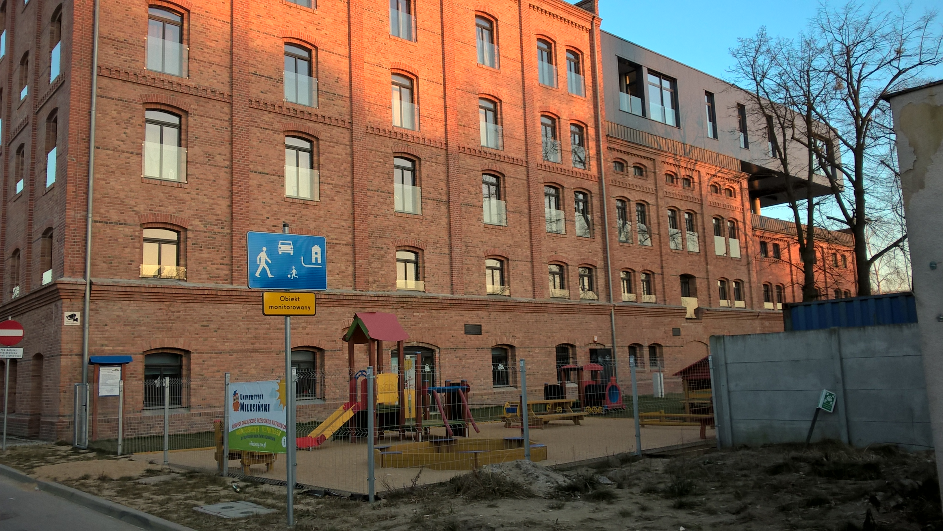 Szamotuły - pierwotnie Młyn Żytni, obecnie (od 2014) budynek mieszkalno-usługowy (widok od ulicy Młyńskiej)